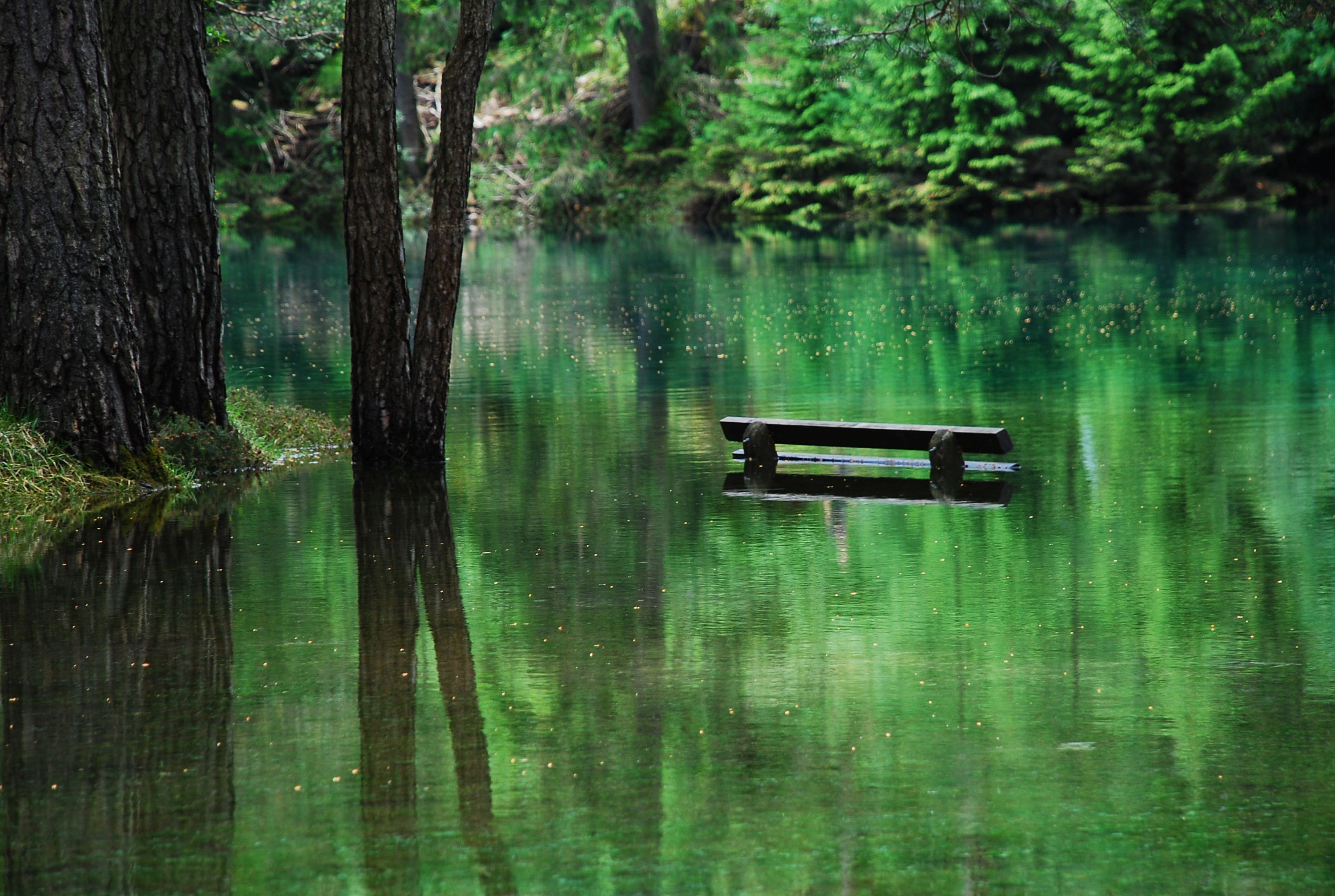 Grüner See bei Tragöß (Steiermark) bei mittlerem Wasserpegel